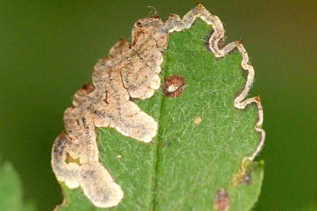 Stigmella magdalenae from Commanster, Belgian High Ardennes .